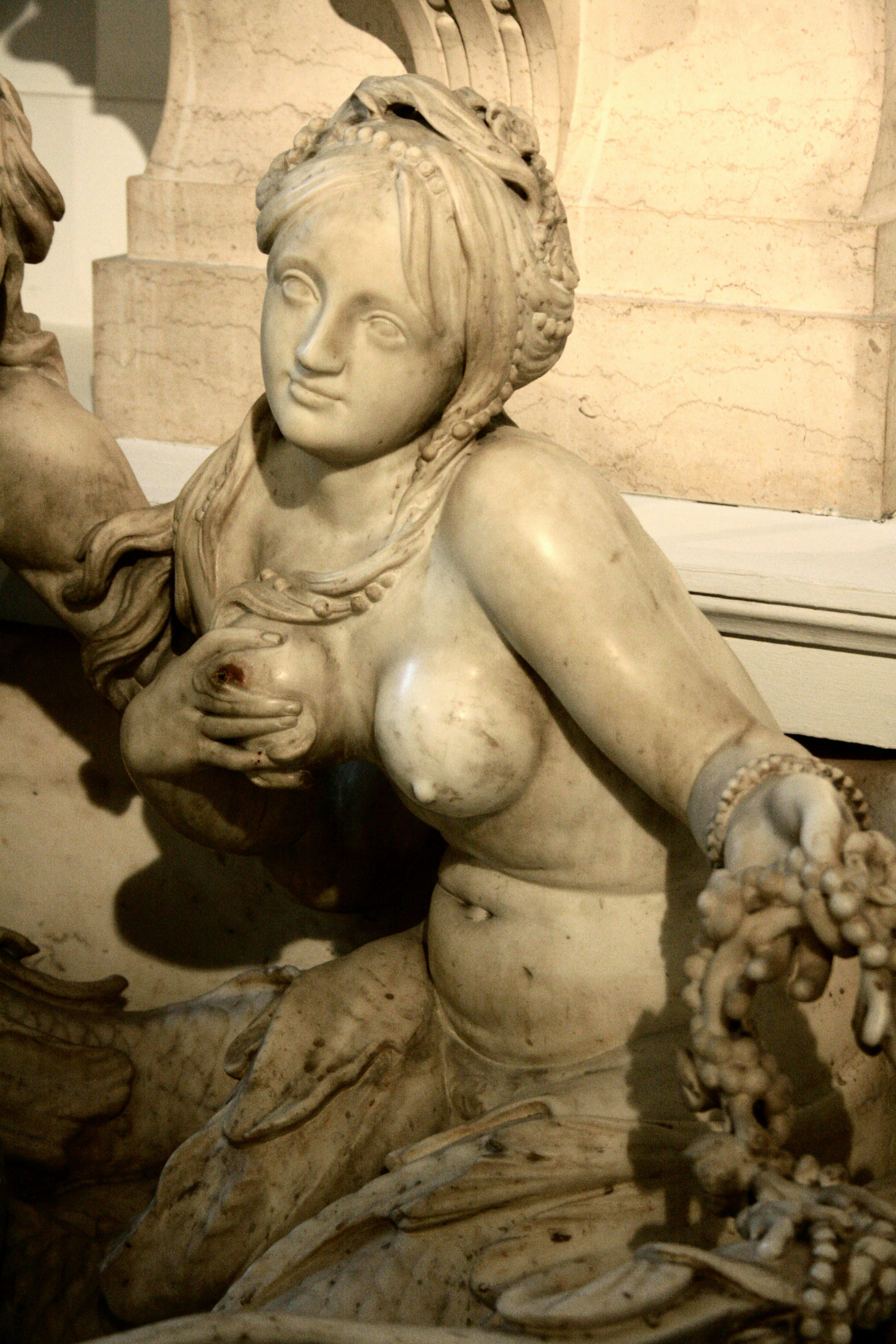 Gabriel Grupello, Fontaine murale aux dieux marins (marbre) : détail (Téthys). Commandée par la gilde des Poissonniers de Bruxelles en 1675. Musées royaux des Beaux-Arts de Belgique